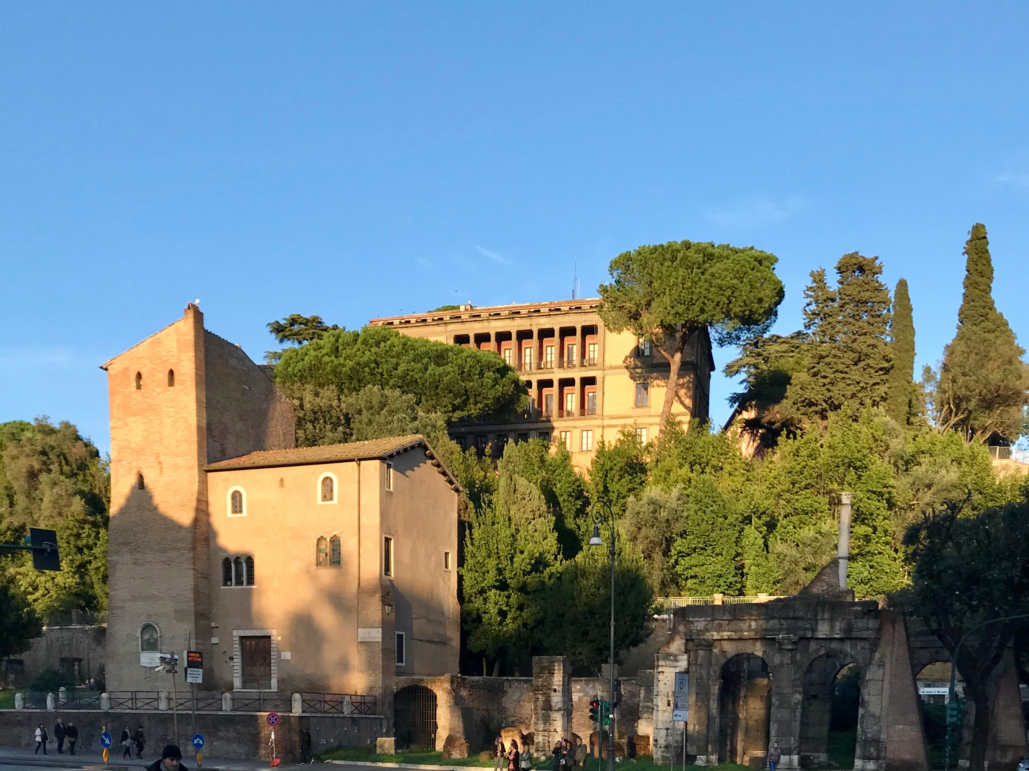 Ex Istituto Germanico in Rome